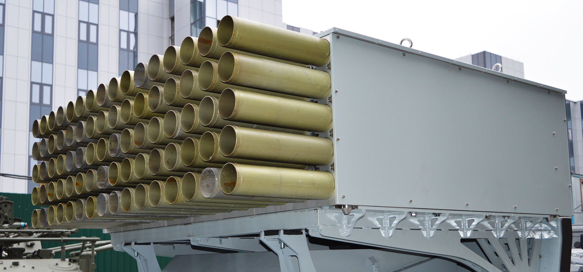 Пакет направляющих РСЗО Флейта для 80-мм неуправляемых авиационных ракет (аналог НУРС). Фото сделано в Минске в 2019 году